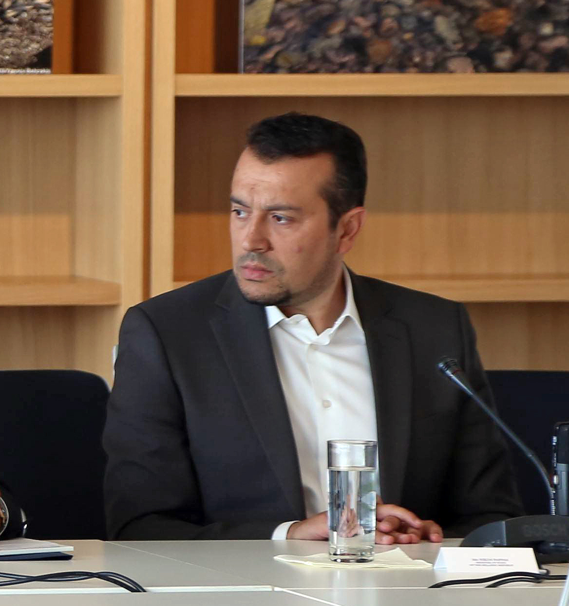 Oι εργασίες της Συνόδου Υπουργών Ευρωπαϊκών Υποθέσεων και κορυφαίων στελεχών του Ευρωκοινοβουλίου που πραγματοποιήθηκε σήμερα στην Αθήνα, στο Κέντρο Πολιτισμού του Ιδρύματος Σταύρος Νιάρχος στο Φαληρικό Δέλτα ολοκληρώθηκαν με κοινή διακήρυξη, στην οποία γίνεται αναφορά στην ανάγκη ευελιξίας κατά την εφαρμογή του Συμφώνου Σταθερότητας και Ανάπτυξης, δίδεται έμφαση στο σκέλος της ανάπτυξης, όπως επίσης στην προώθηση των δημοκρατικών διαδικασιών στην Ευρώπη και στην ενίσχυση της λογοδοσίας και του ρόλου του Ευρωπαϊκού Κοινοβουλίου. Φιλοξενούμενοι του Αναπληρωτή Υπουργού Εξωτερικών, αρμόδιου για Ευρωπαϊκές Υποθέσεις, Νίκου Ξυδάκη, ήταν ο Γάλλος Υφυπουργός Ευρωπαϊκών Υποθέσεων, Αρλέμ Ντεζίρ, ο Αναπληρωτής Πρωθυπουργός και Υπουργός Ευρωπαϊκών Υποθέσεων της Μάλτας, Λουίς Γκρες, ο Ιταλός Υφυπουργός Ευρωπαϊκών Υποθέσεων παρά τω Πρωθυπουργώ, Σάντρο Γκότσι, η Υφυπουργός Ευρωπαϊκών Υποθέσεων της Πορτογαλίας, Μαργκαρίντα Μάρκες ενώ εκ μέρους της ελληνικής κυβέρνησης συμμετείχε ο Υπουργός Επικρατείας, Νίκος Παππάς. Από την πλευρά του Ευρωπαϊκού Κοινοβουλίου συμμετείχαν ο Αντιπρόεδρός του Δημήτρης Παπαδημούλης και ο Αντιπρόεδρος της Προοδευτικής Συμμαχίας Σοσιαλιστών και Δημοκρατών, ευρωβουλευτής Ενρίκε Γκερέρο Σαλόμ.